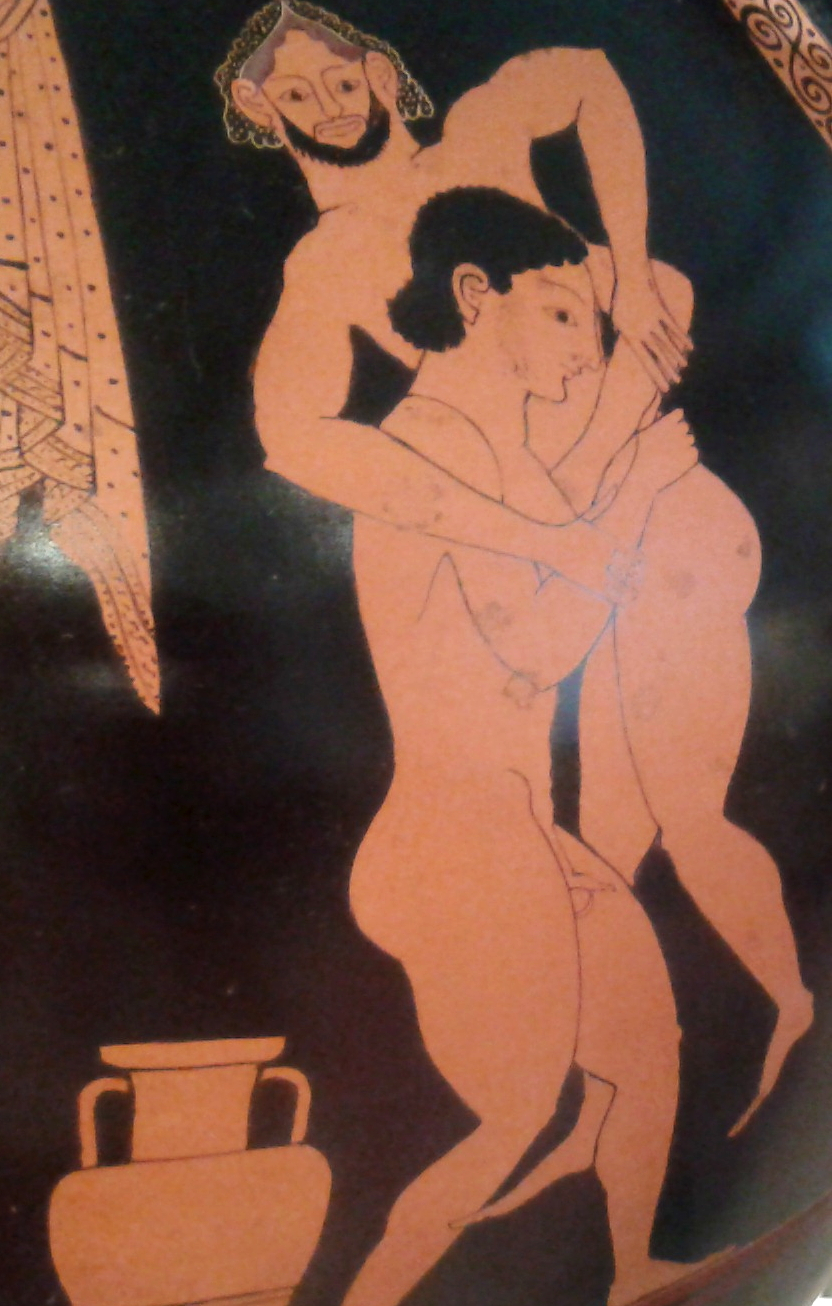 Antike, nackte Ringer. Attische Tonvase ca. 530 v. Chr. aus Vulci, Italien, Altes Museum Berlin